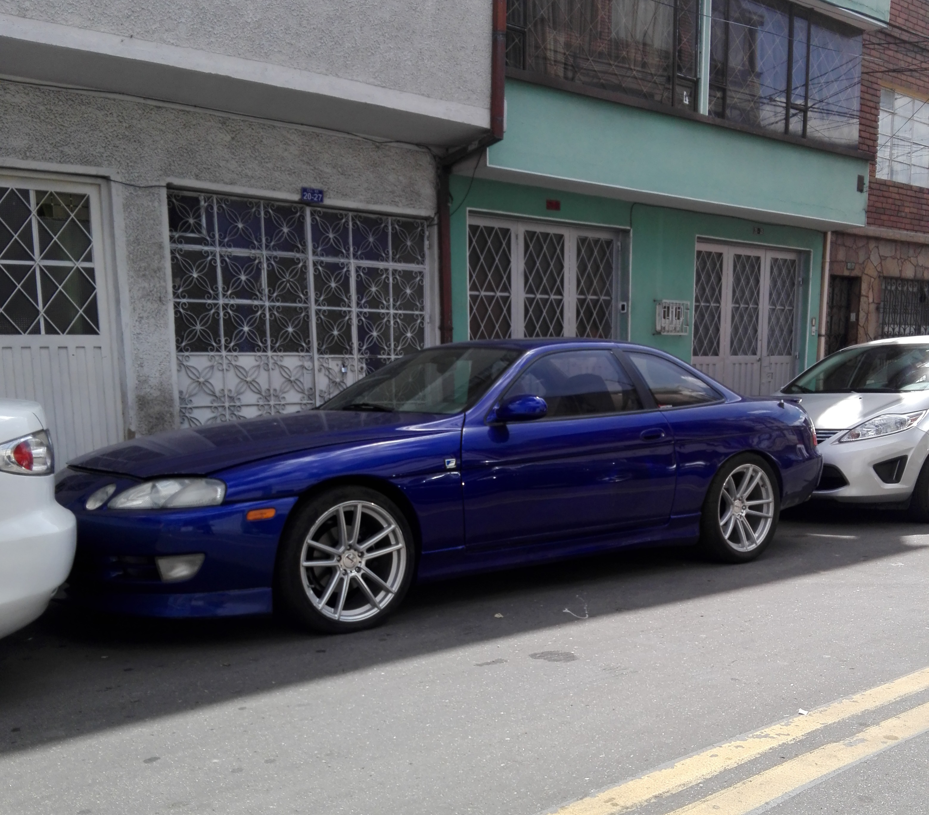 Lexus SC 400 1993